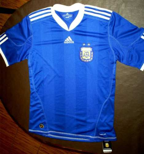 Camiseta visitante que será usada por la Selección Argentina de Fútbol en el Mundial de Sudáfrica 2010.